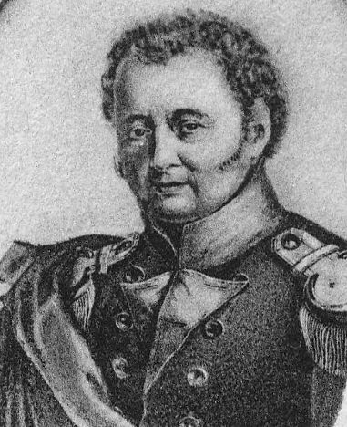 Kommandeur Ulanen-Regiment "Großherzog Friedrich von Baden" (Rheinisches) Nr. 7